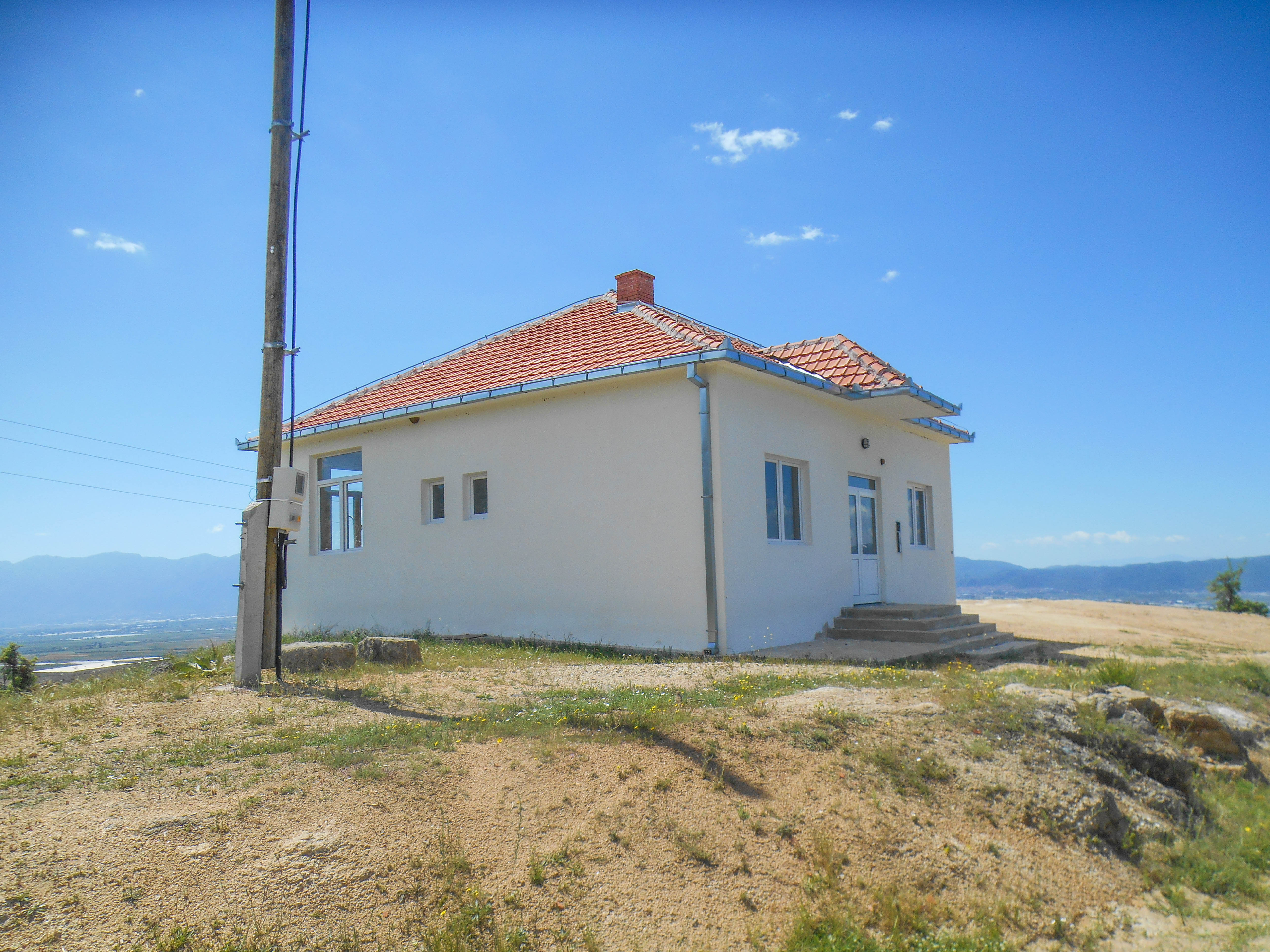 Основно училиште „Атанас Нивичански“ - Висока Маала